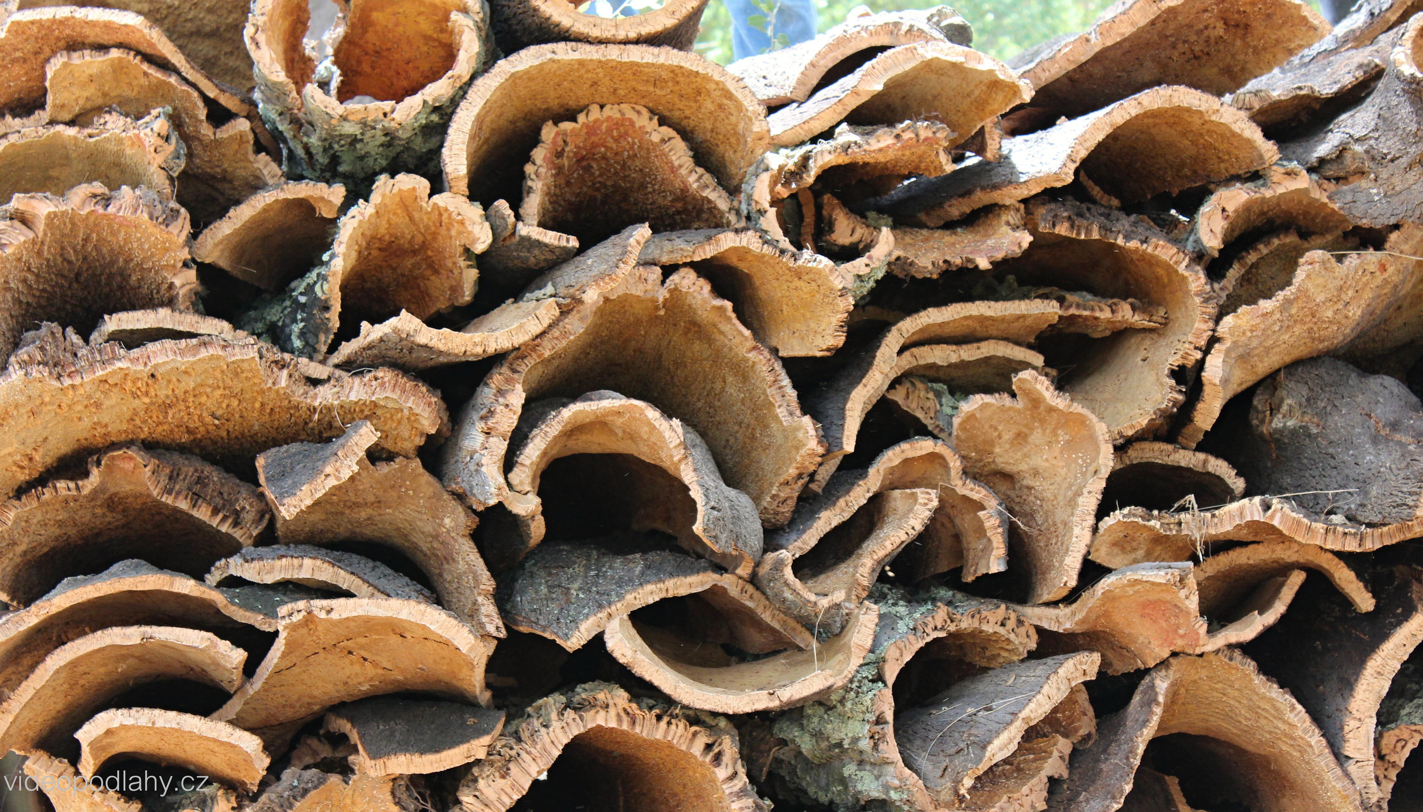 Portugalsko - korková kůra sloupaná ze stromu